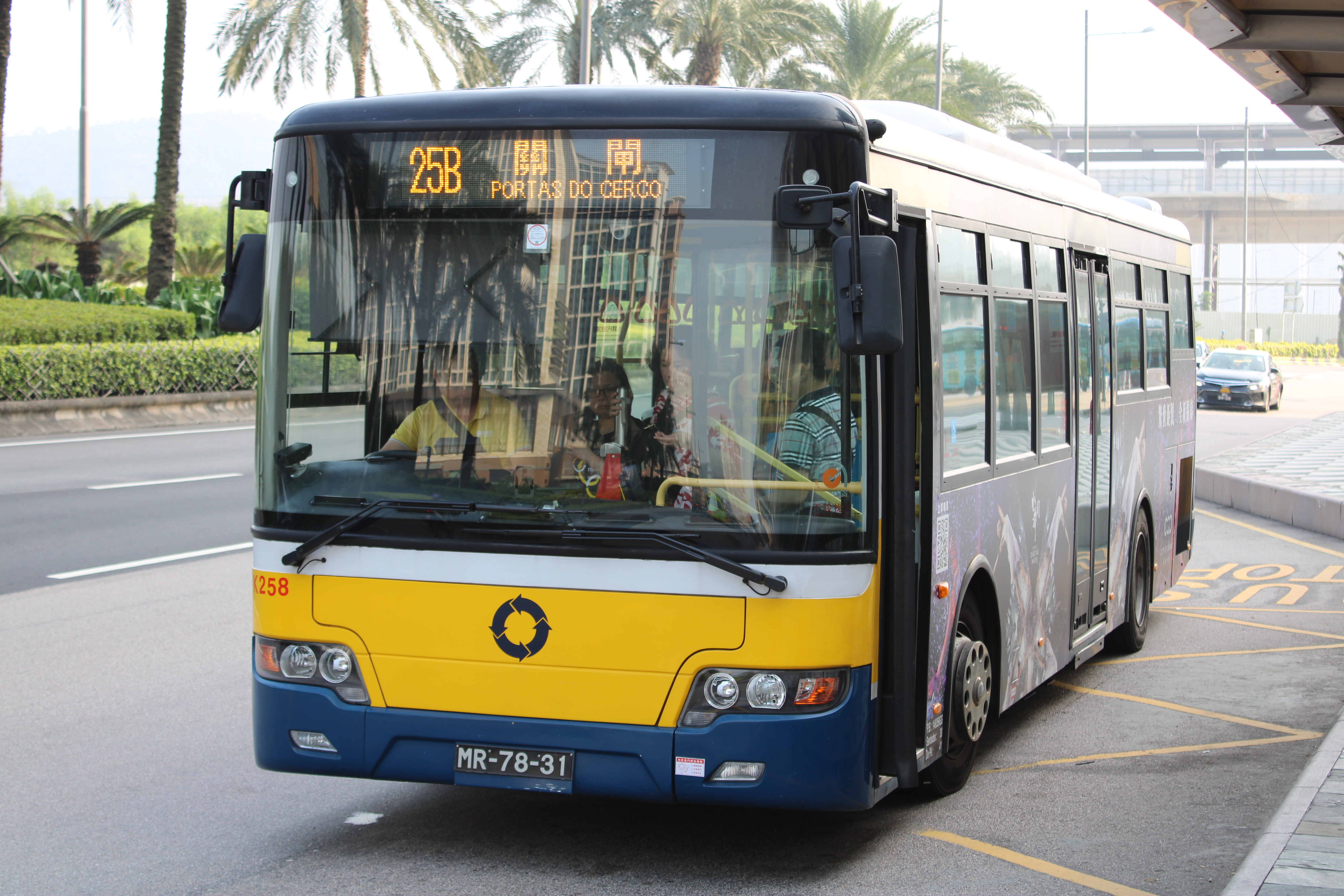 新福利蘇州金龍KLQ6108GQ28E4行駛25B路線。